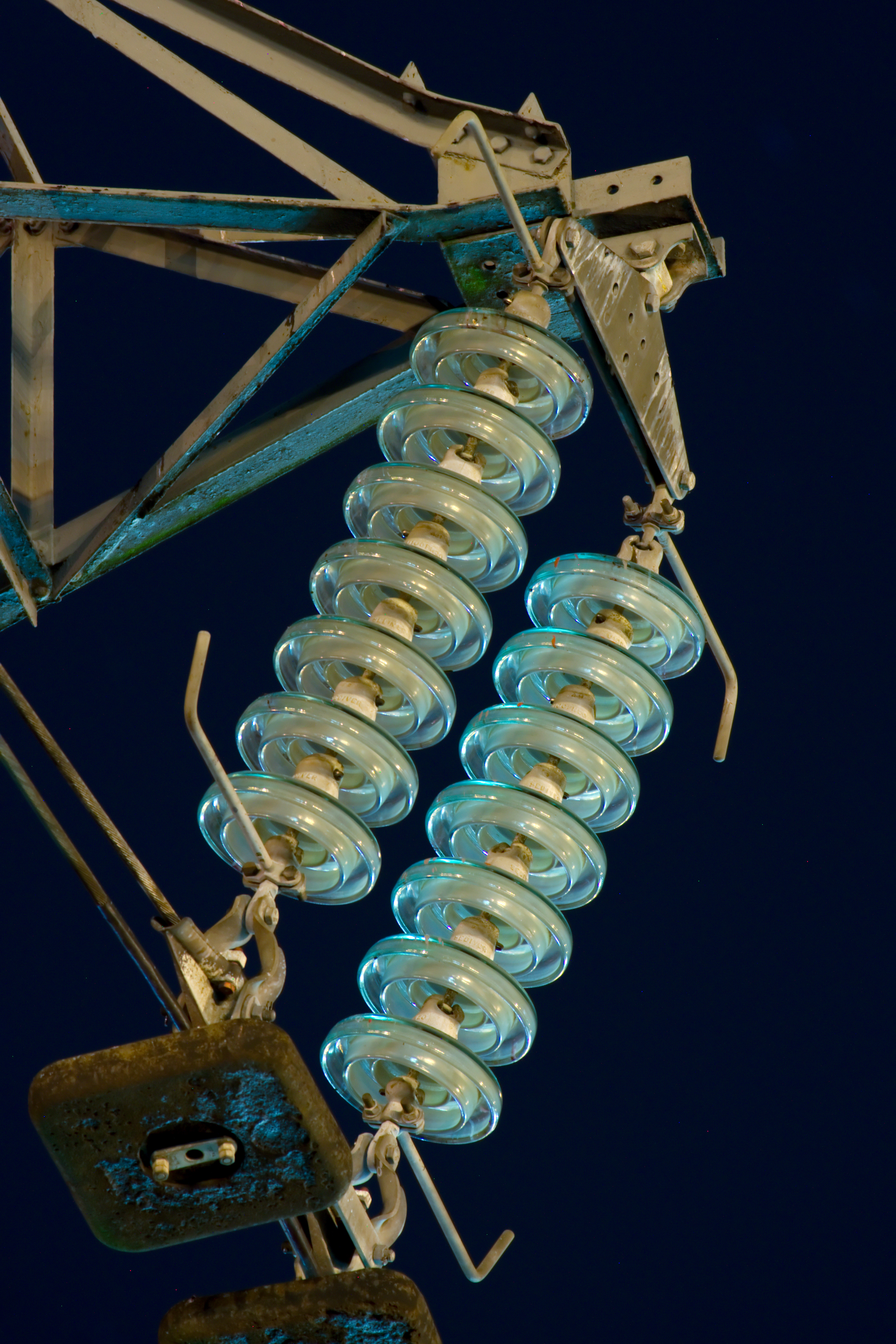 Détail d’un pylône électrique